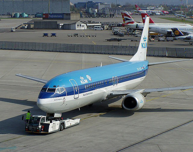 Boeing 737-406 der KLM am Flughafen Zürich-Kloten Fotografiert am de:19. April de:2003 Benny Bartels Copyright Status: GNU Freie Dokumentationslizenz, Publikation mit Genehmigung des Fotografen